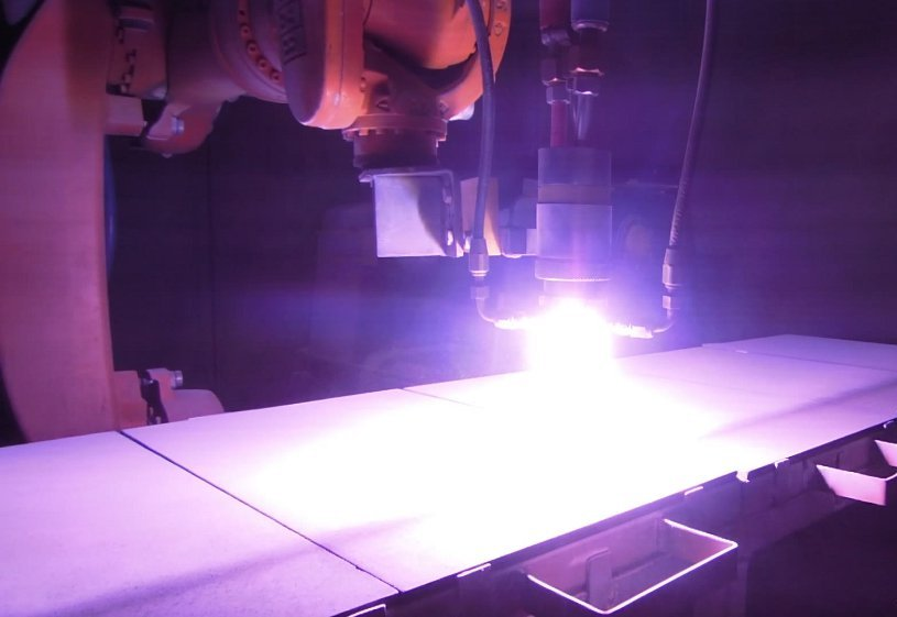 Нанесение покрытия оксида алюминия на графитовые пластины плазменным напылением в центре функциональных покрытий ЗАО "Плакарт" в г. Щербинка